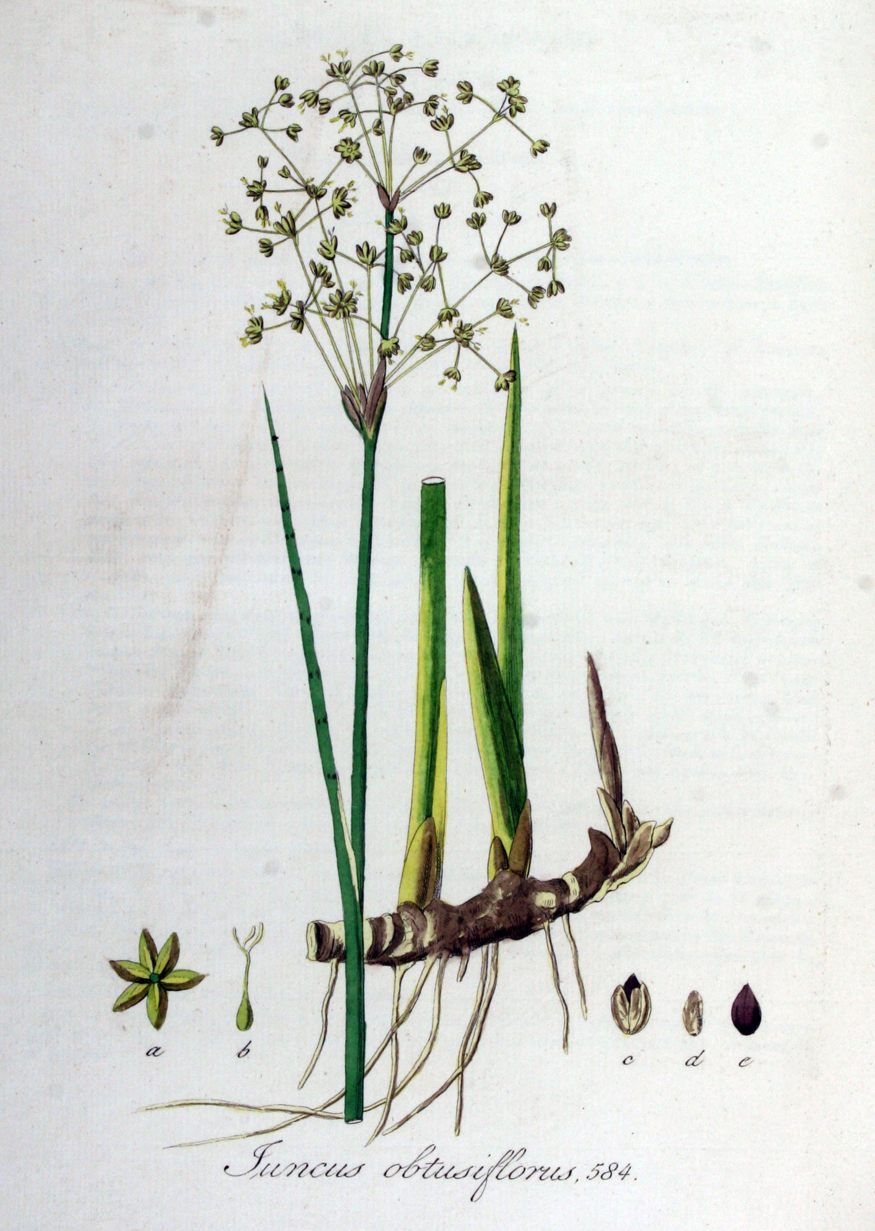 Juncus subnodulosus Schrank (Syn. Juncus obtusiflorus Ehrh. ex Hoffmann)